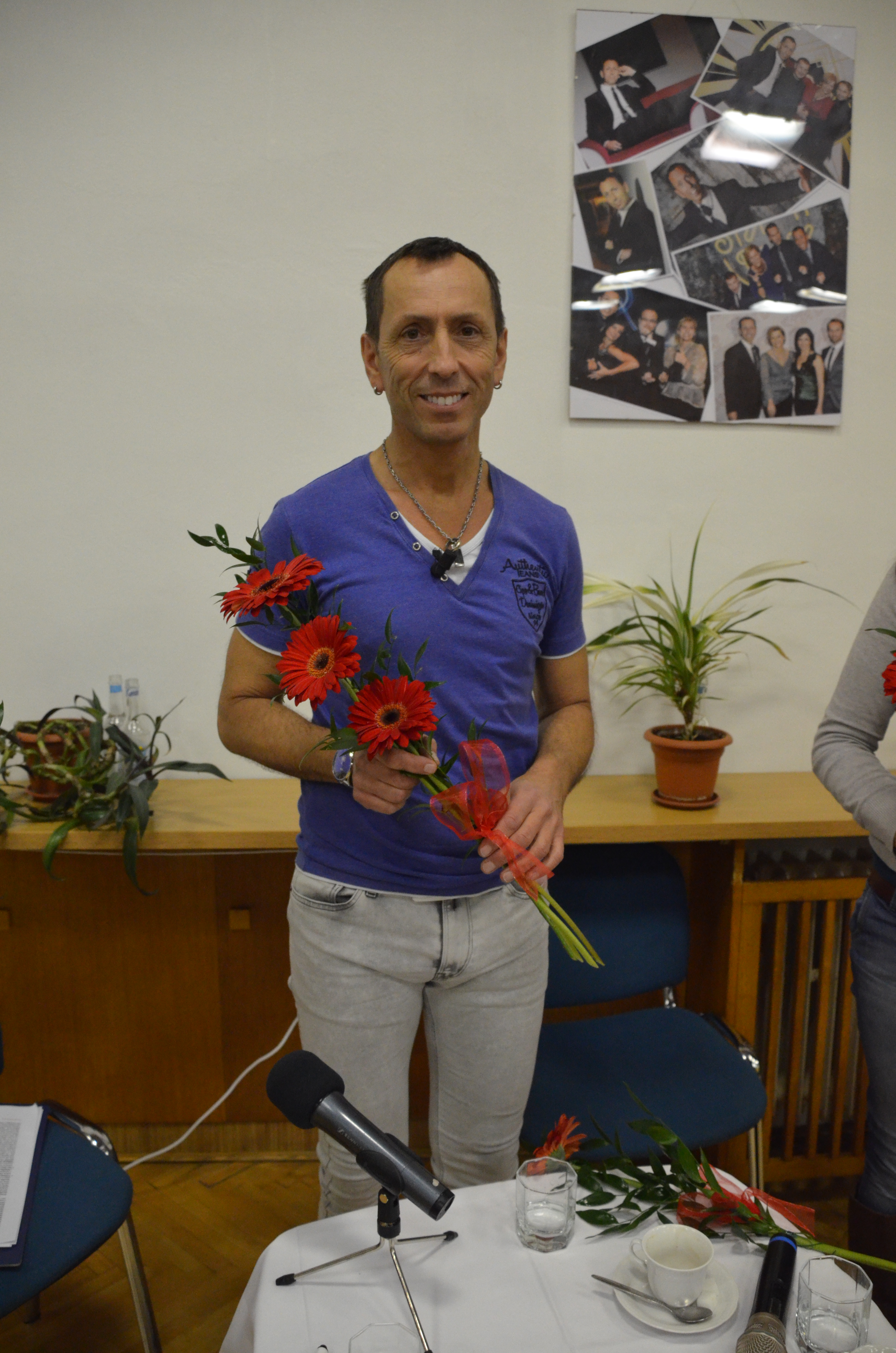 Zdeněk Chlopčík na besedě v Adamově